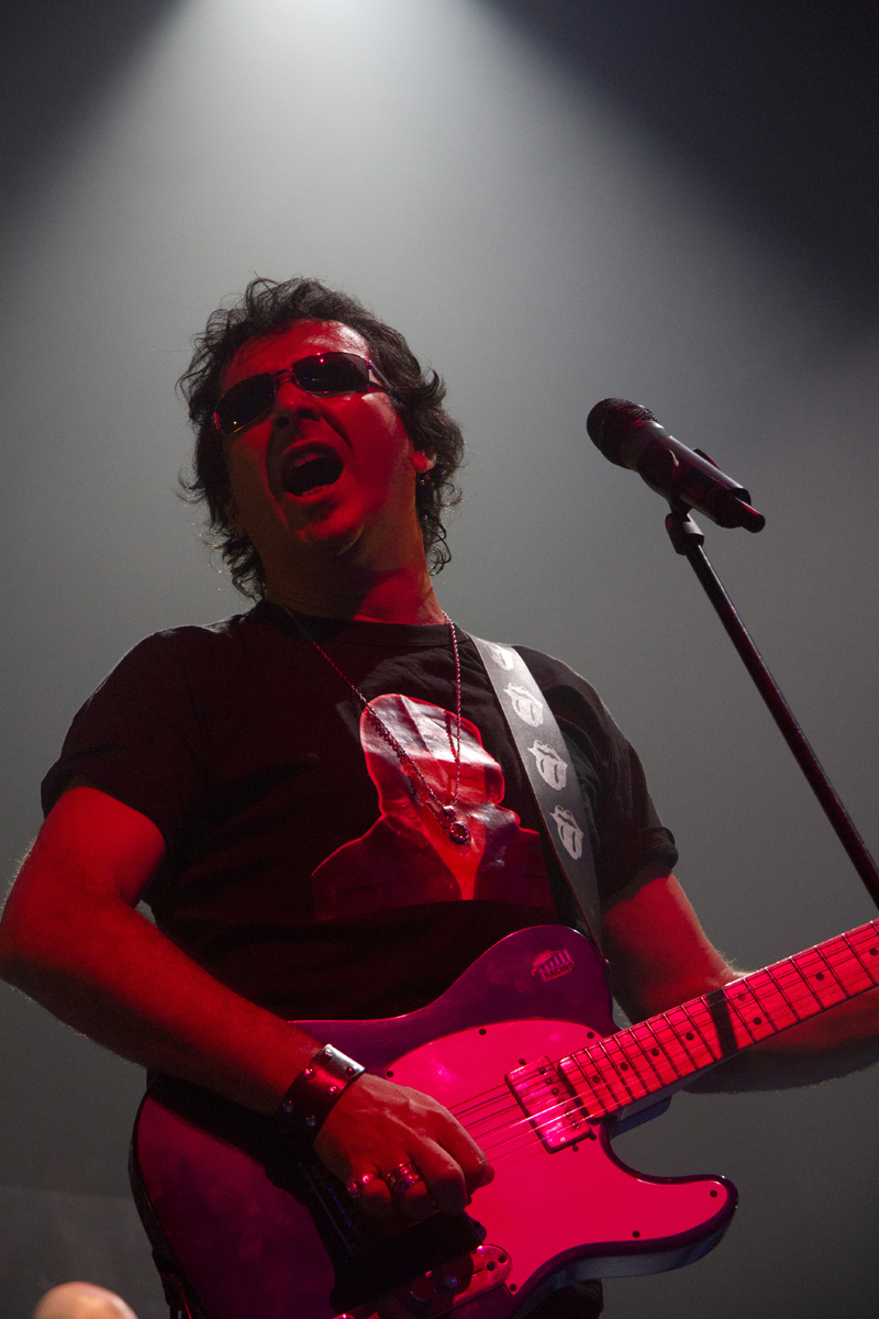 ... Carlos Gardellini en voz y guitarra … (Foto: Estrella Herrera)